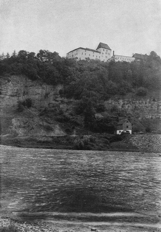 Originalbeschreibung „Fürstenberg“. – Schloss Fürstenberg, Fürstenberg, Niedersachsen, Deutschland.